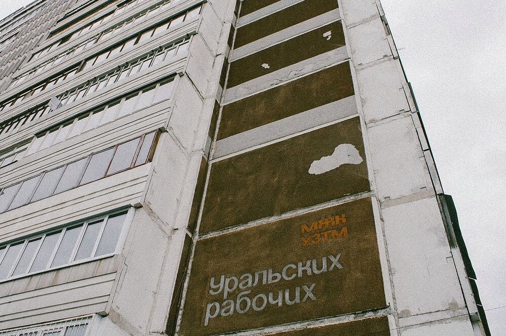 Застройка Уралмаша